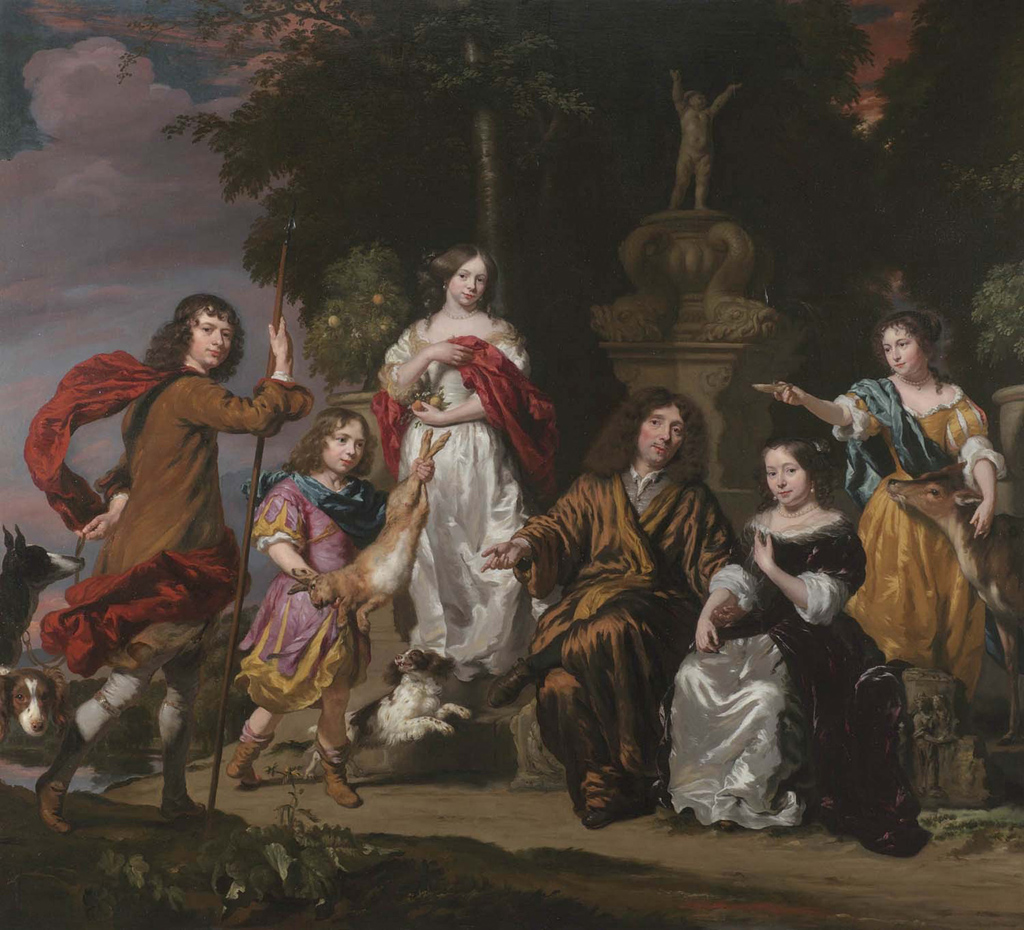 RKDimages, Art-work number 114734.